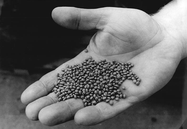 ADN-ZB-Kasper-21.9.1987-pra-Bez. Gera: Neue Erzeugnisse aus Plastabfällen Im Chemiewerk Steudnitz werden jährlich rund 1400 Tonnen Haushaltsplastabfälle aufbereitet und auf Spritzgußmaschinen zu vielerlei Gegenständen verarbeitet. Aus den sortierten Abfällen wird zuerst Granulat hergestellt, das das Ausgangsmaterial für neue Erzeugnisse aus Regenratplast ist. Die Steudnitzer Fahrradpedale, Verpackungsmittel, Blumentöpfe und Pflanzkübel. her. -siehe auch 1987-0921-1 und 3N